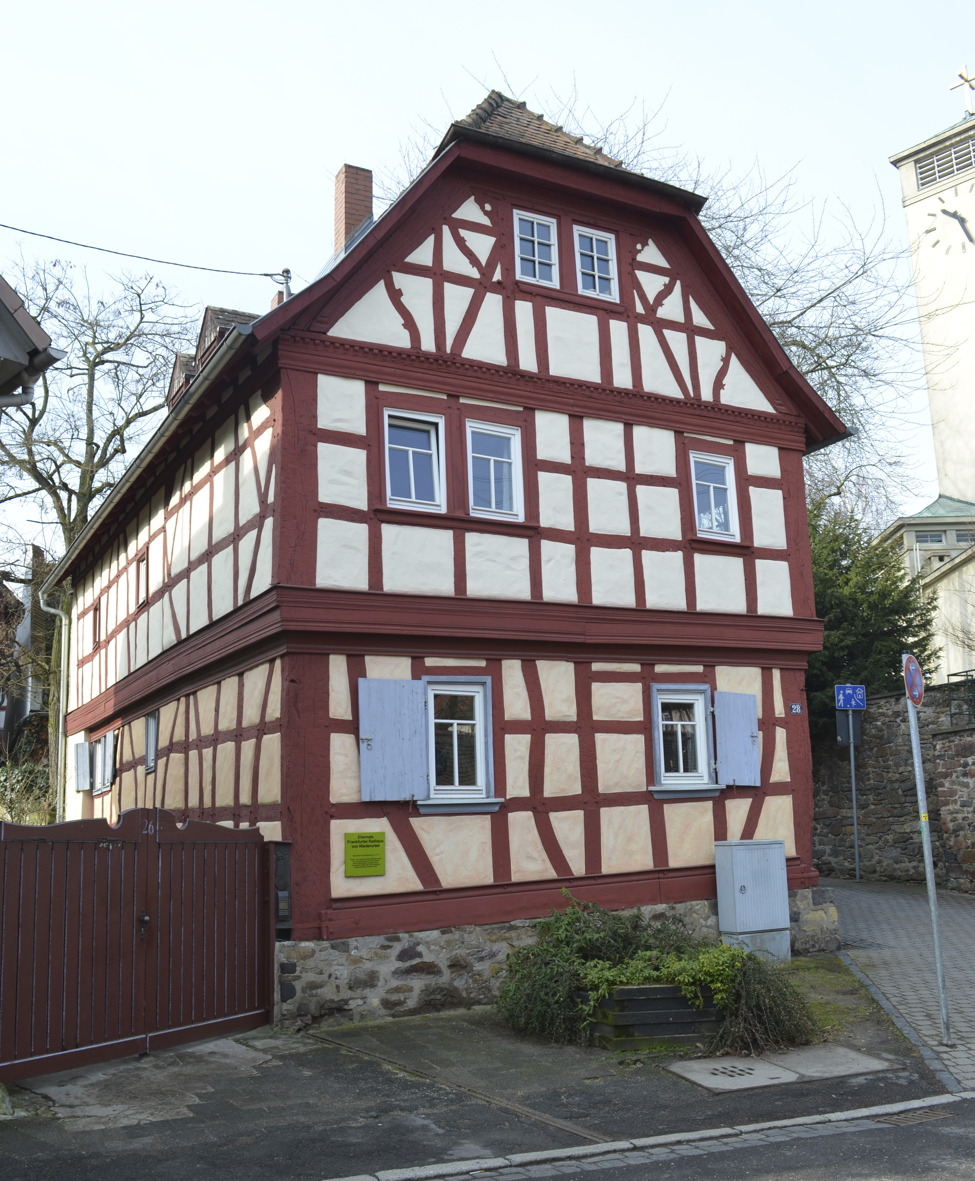 "Frankfurter Rathaus", Alt-Niederursel 28